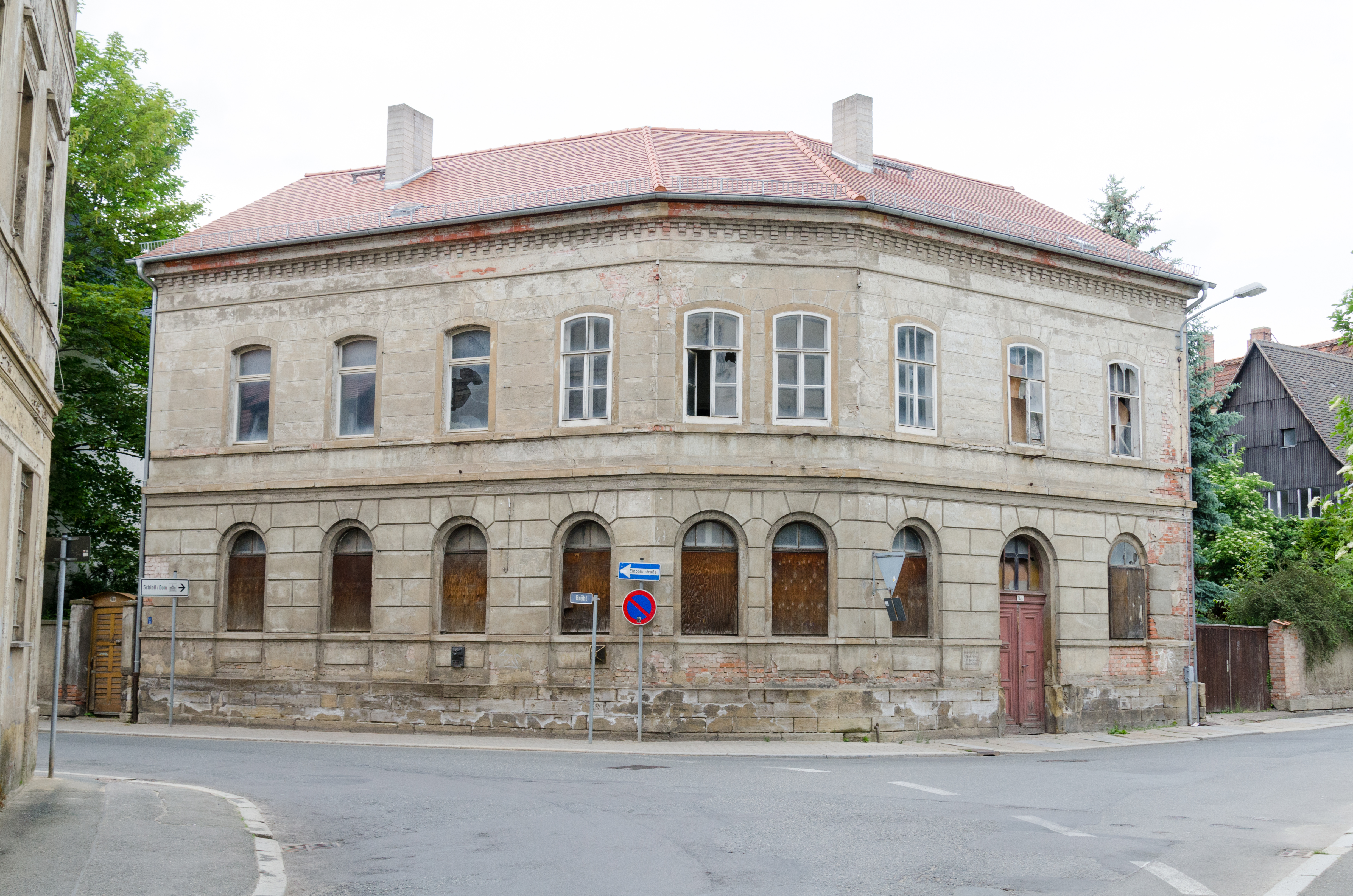 Zeitz, Brühl 14b